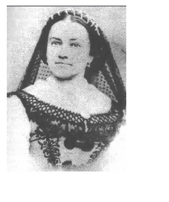 Zsófia Torma Foto Magda Tulok: 100 éve hunyt el Torma Zsófia. In: Holt lóra patkó. Tanulmányok Torma Zsófia (1840-1899) emlé-kezetére. Budapest, 1999, S. 21